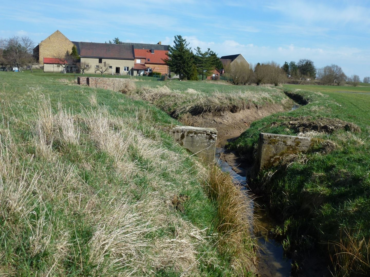 Brösa (von Westen gesehen)